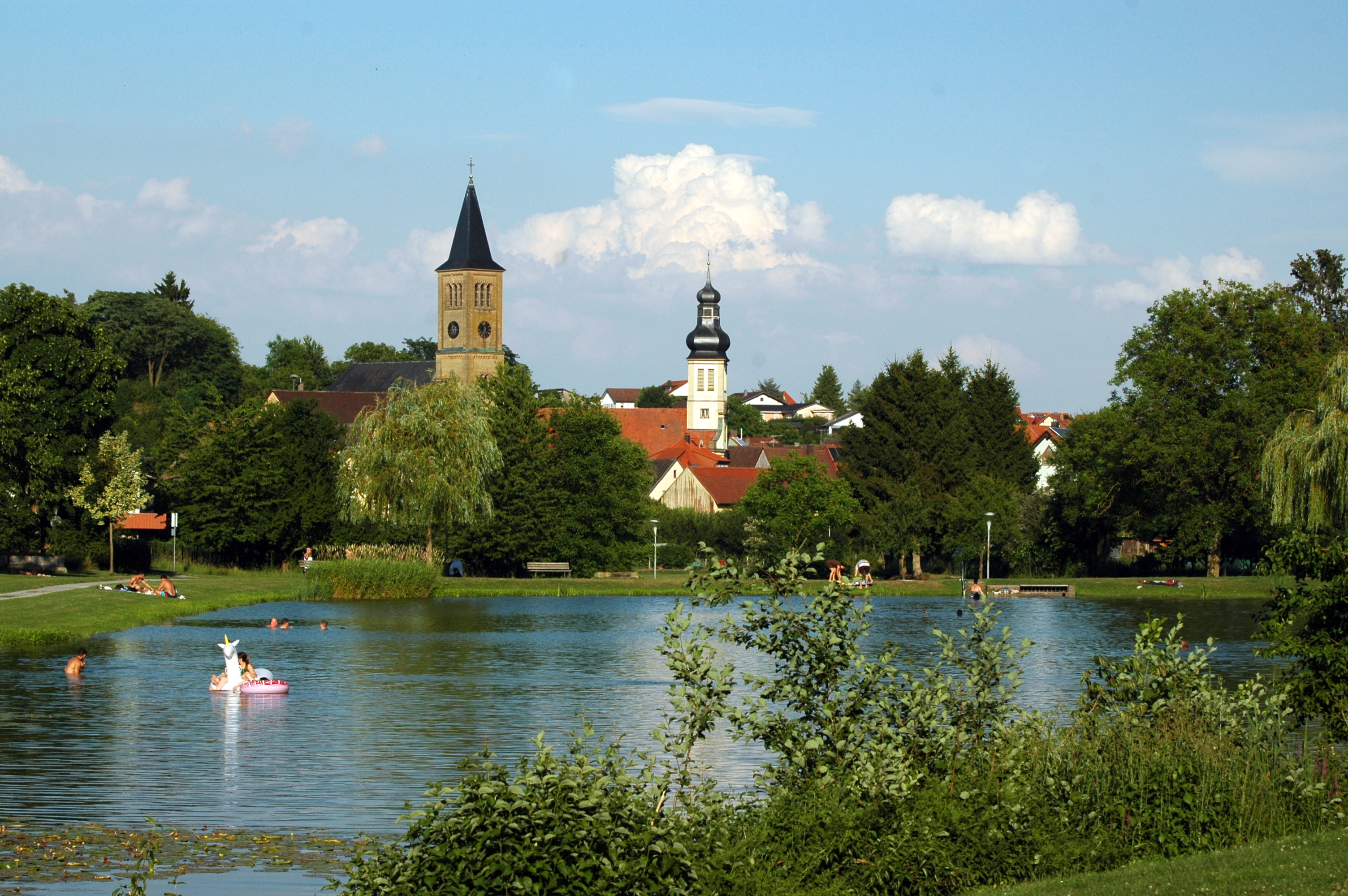 Fluss Elsenz